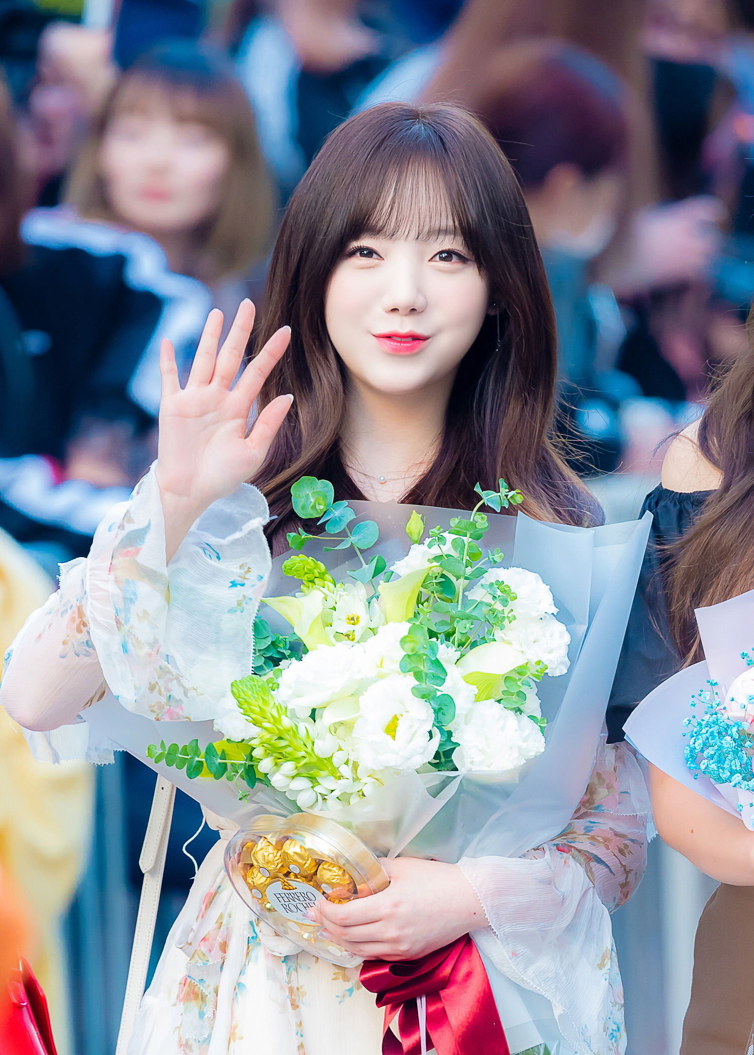 180525 뮤직뱅크 출근길 - 케이